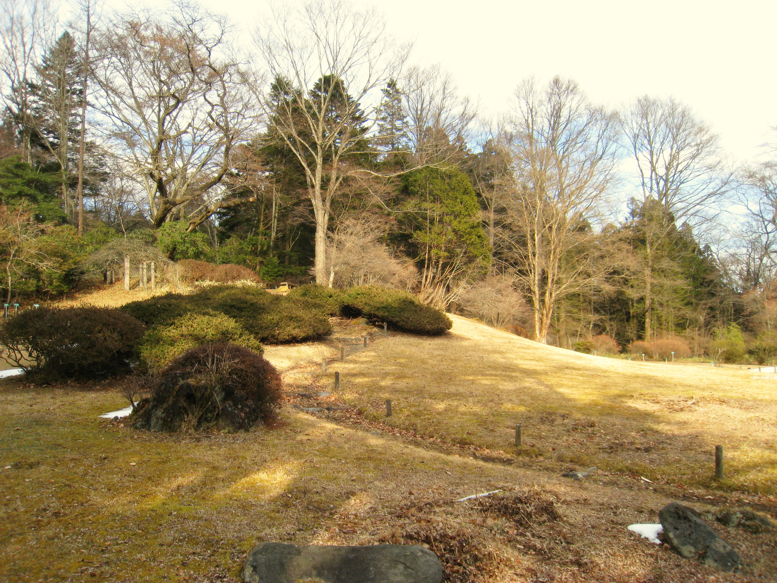 Nikko Botanical Garden, Nikko, Tochigi, Japan. General view in midwinter.